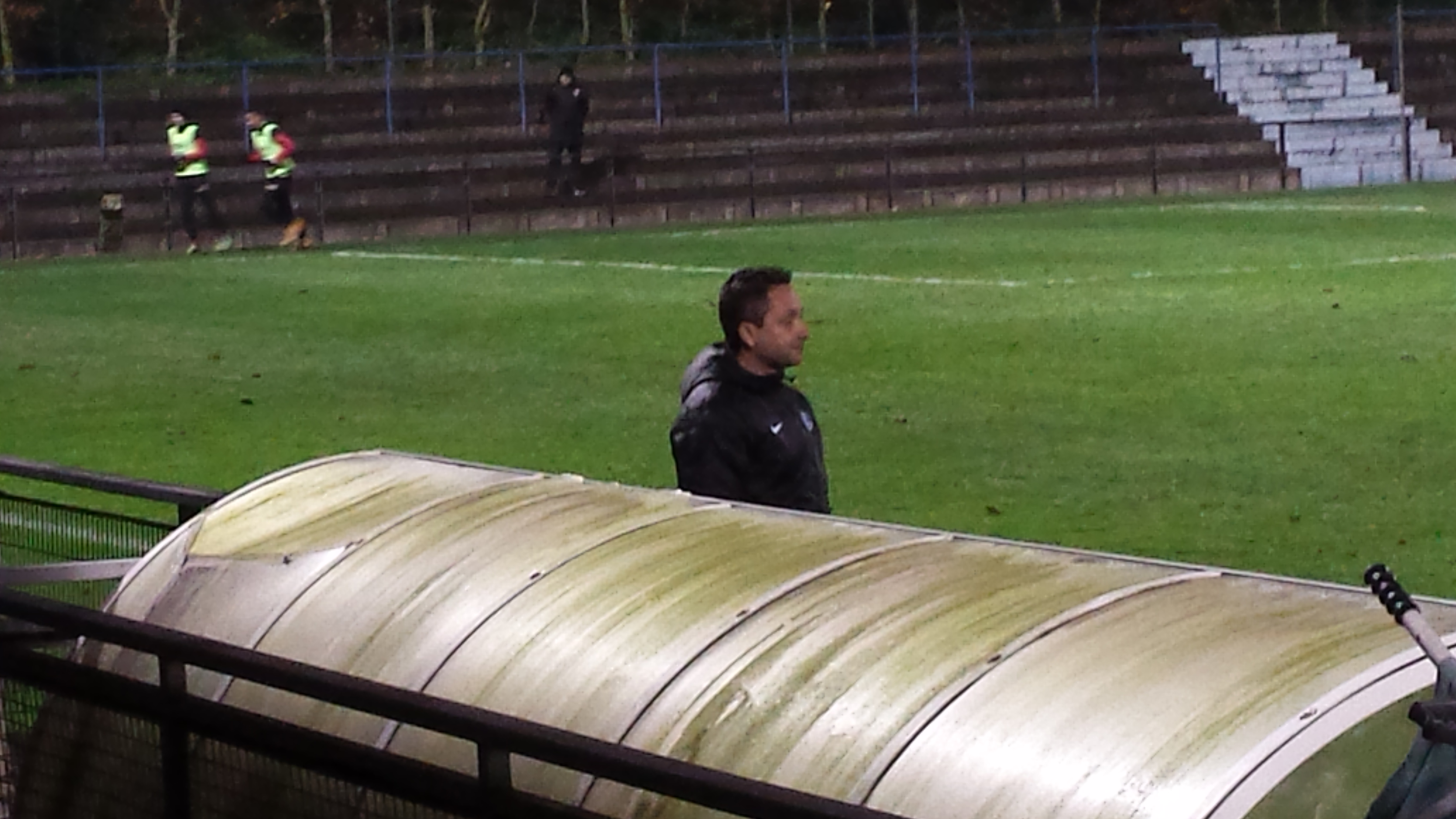 Emmanuel Da Costa, entraîneur de l'US Quevilly, lors de la rencontre Lens B - Quevilly, au Stade François Blin d'Avion, comptant pour la douzième journée de CFA Groupe A (Quatrième division française) de football.